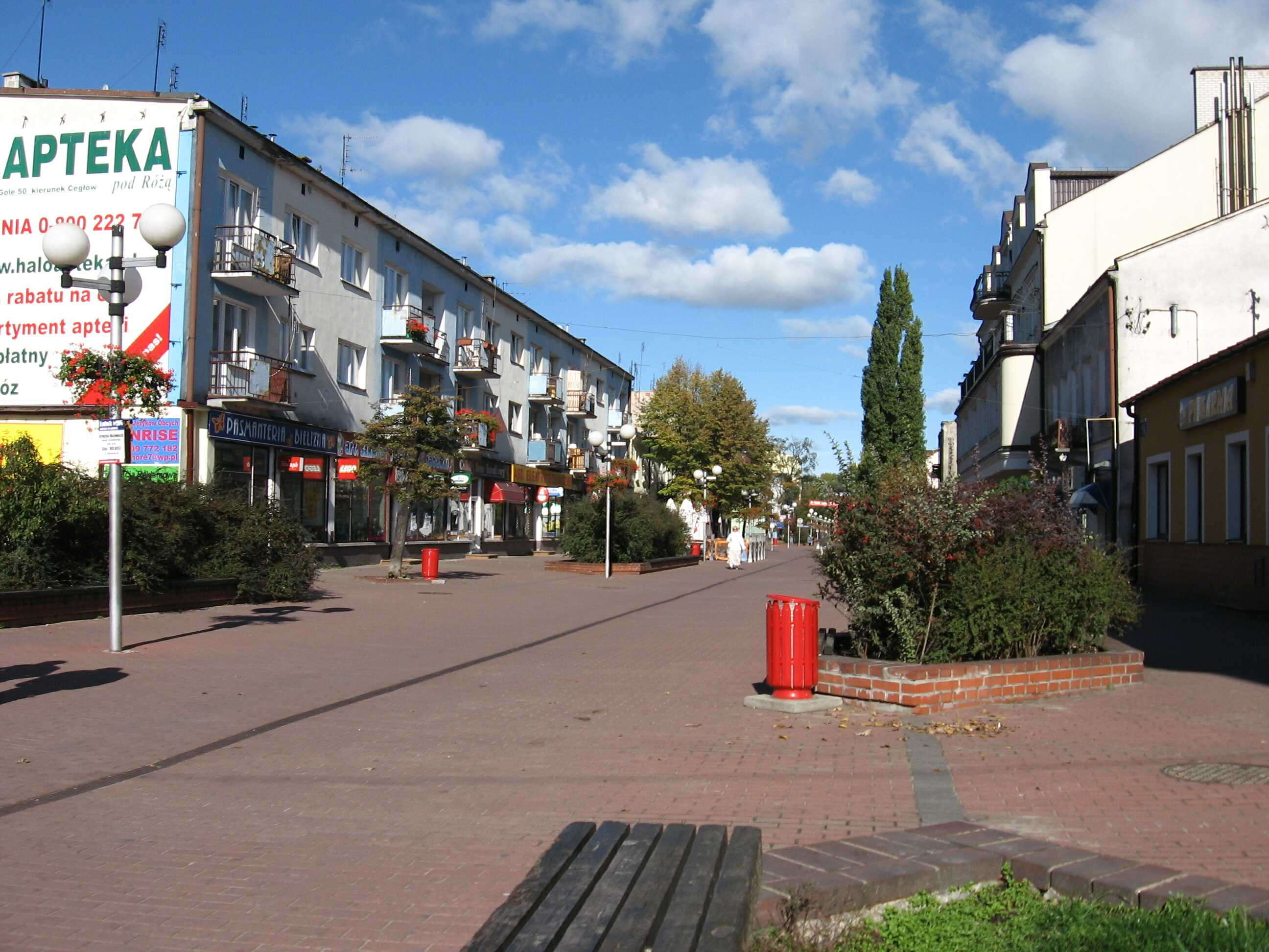 11 Listopada Street in Grodzisk Mazowiecki